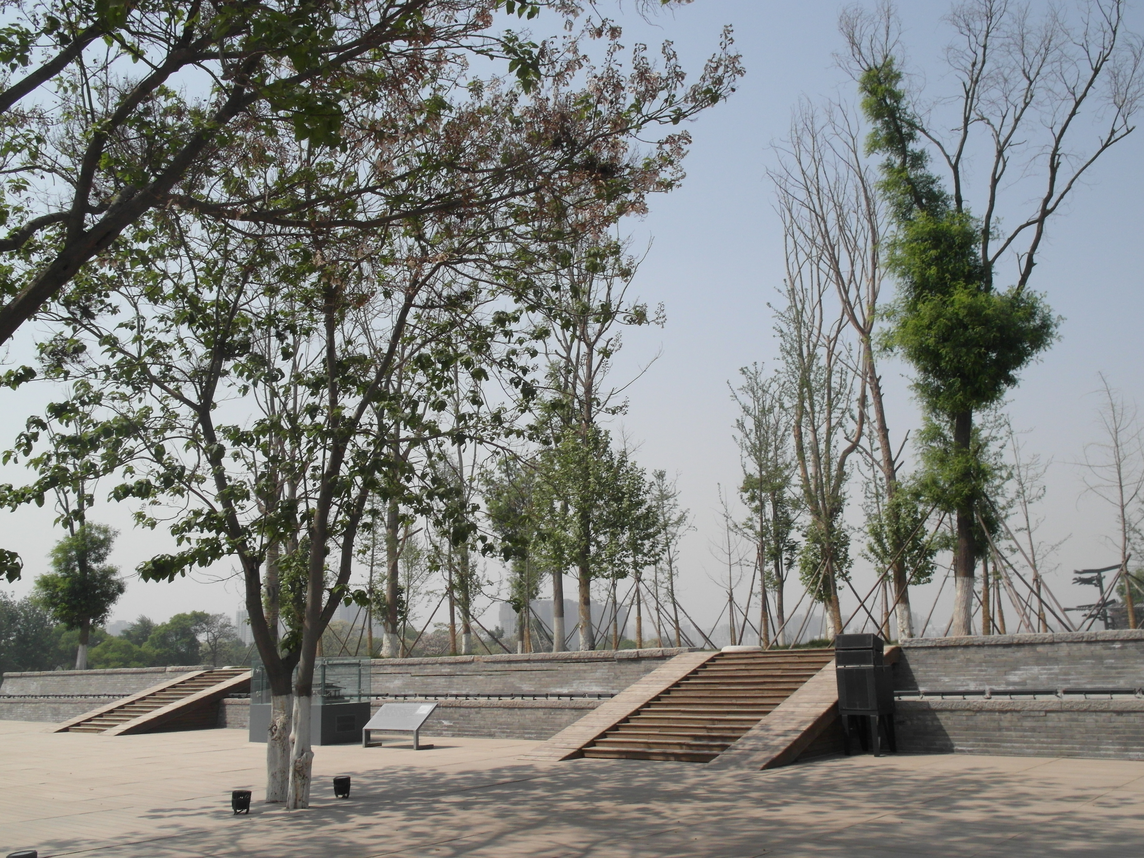 位于陕西省西安市北的大明宫遗址公园内